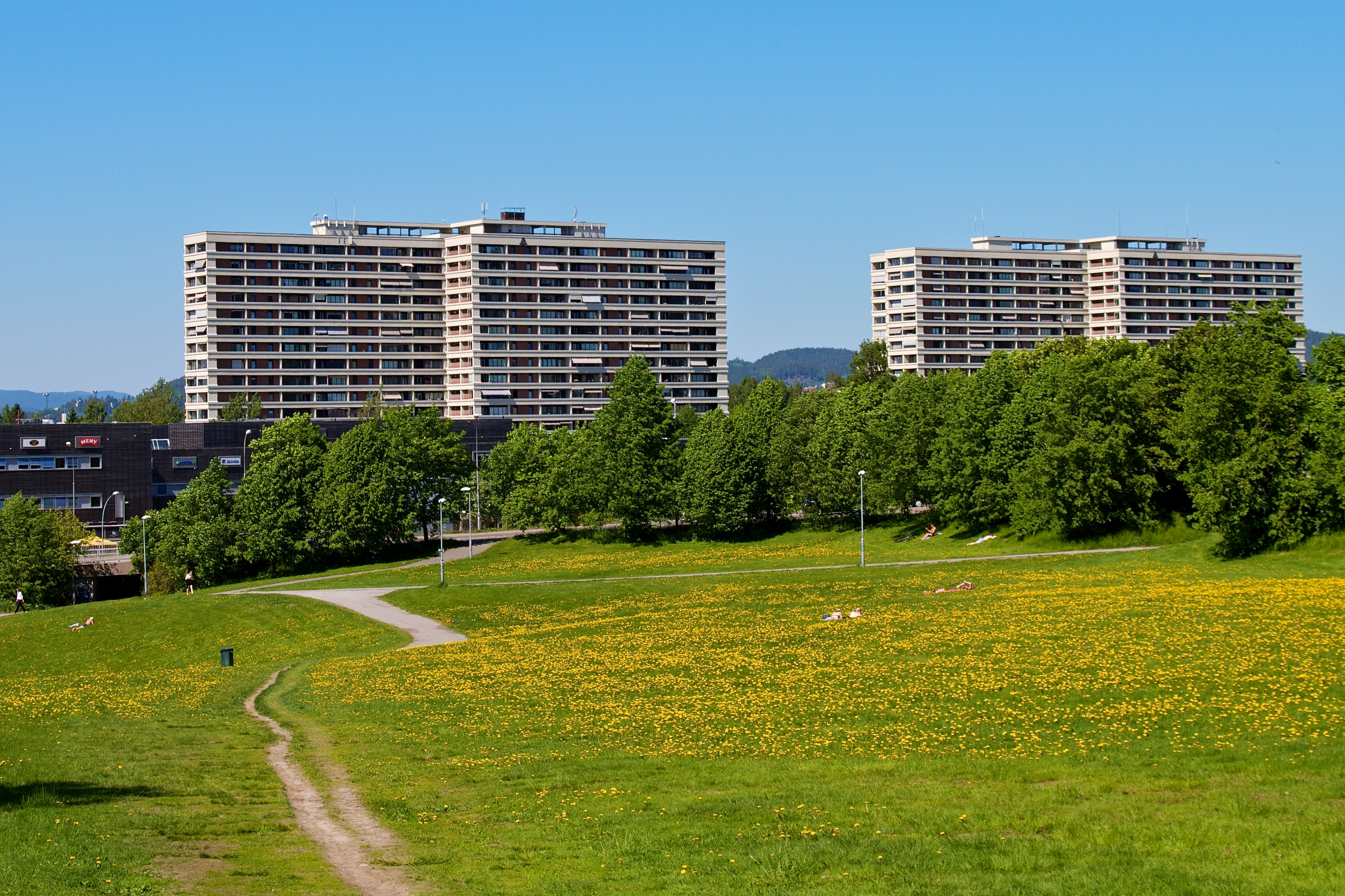 Tveita i Oslo.